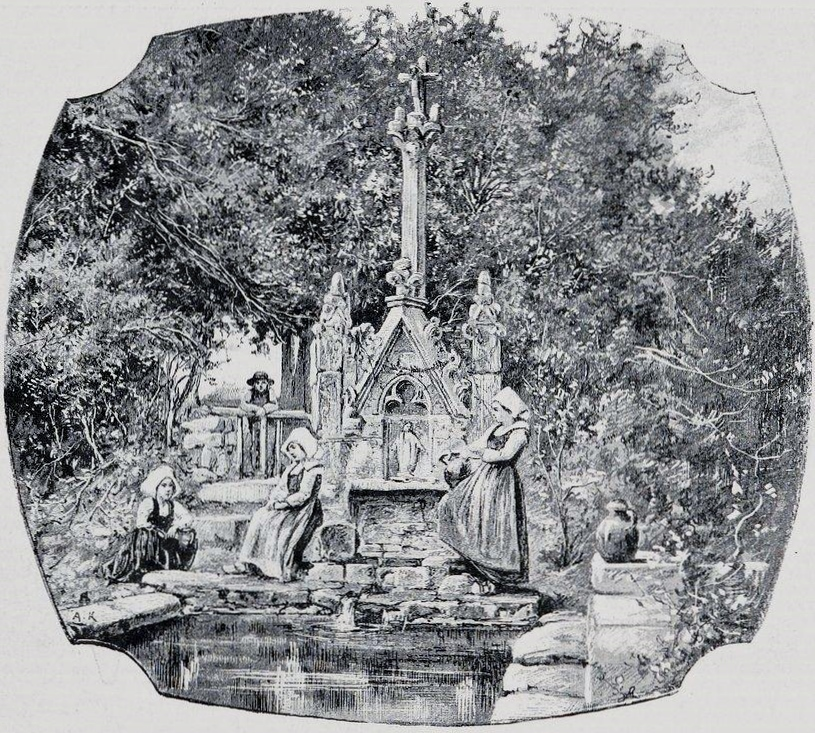 Clohars-Fouesnant : la fontaine du Drennec avant 1903 (dessin de A.Karl)